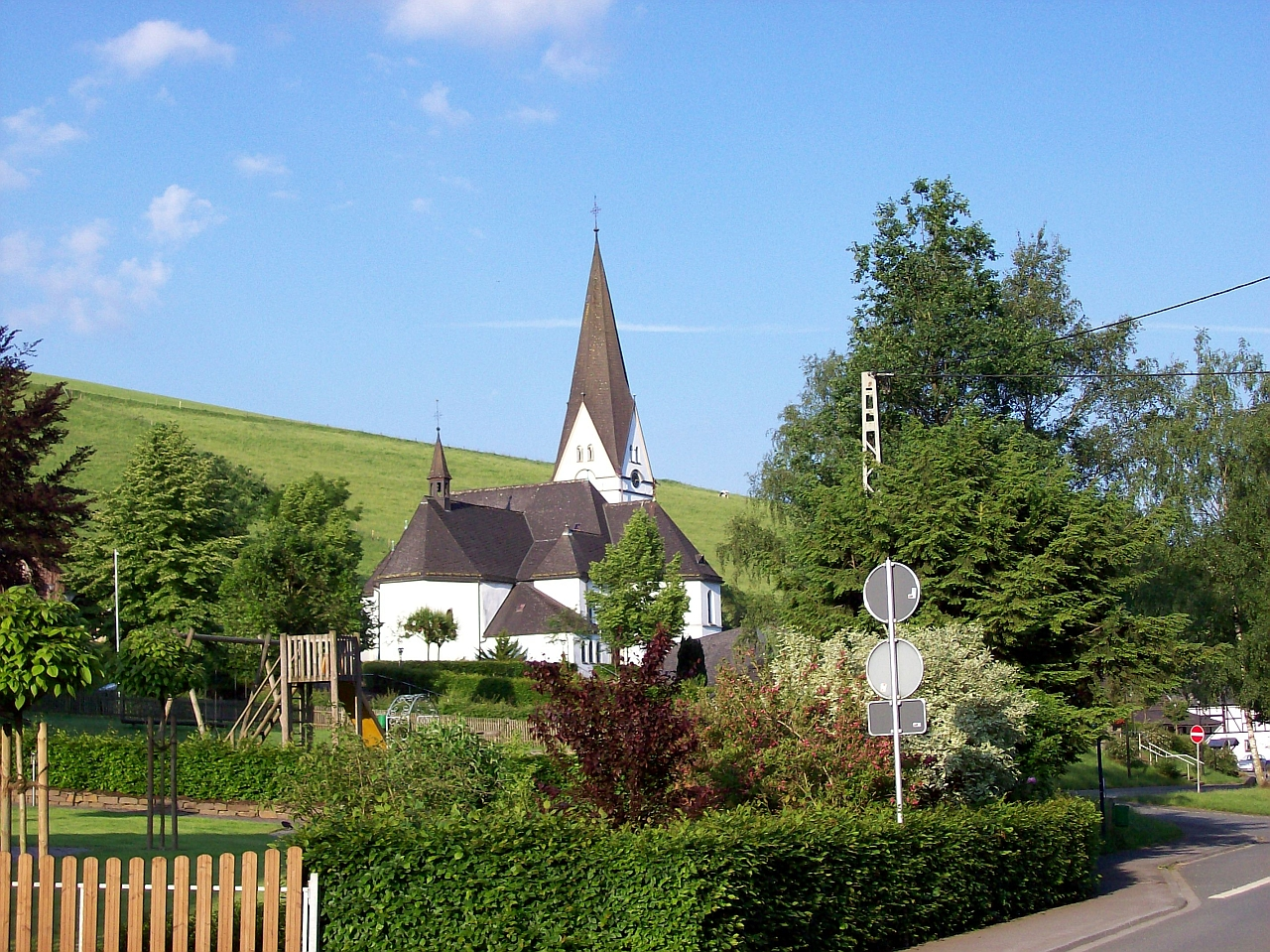 Kirche in Schmallenberg-Kirchrarbach (Germany)